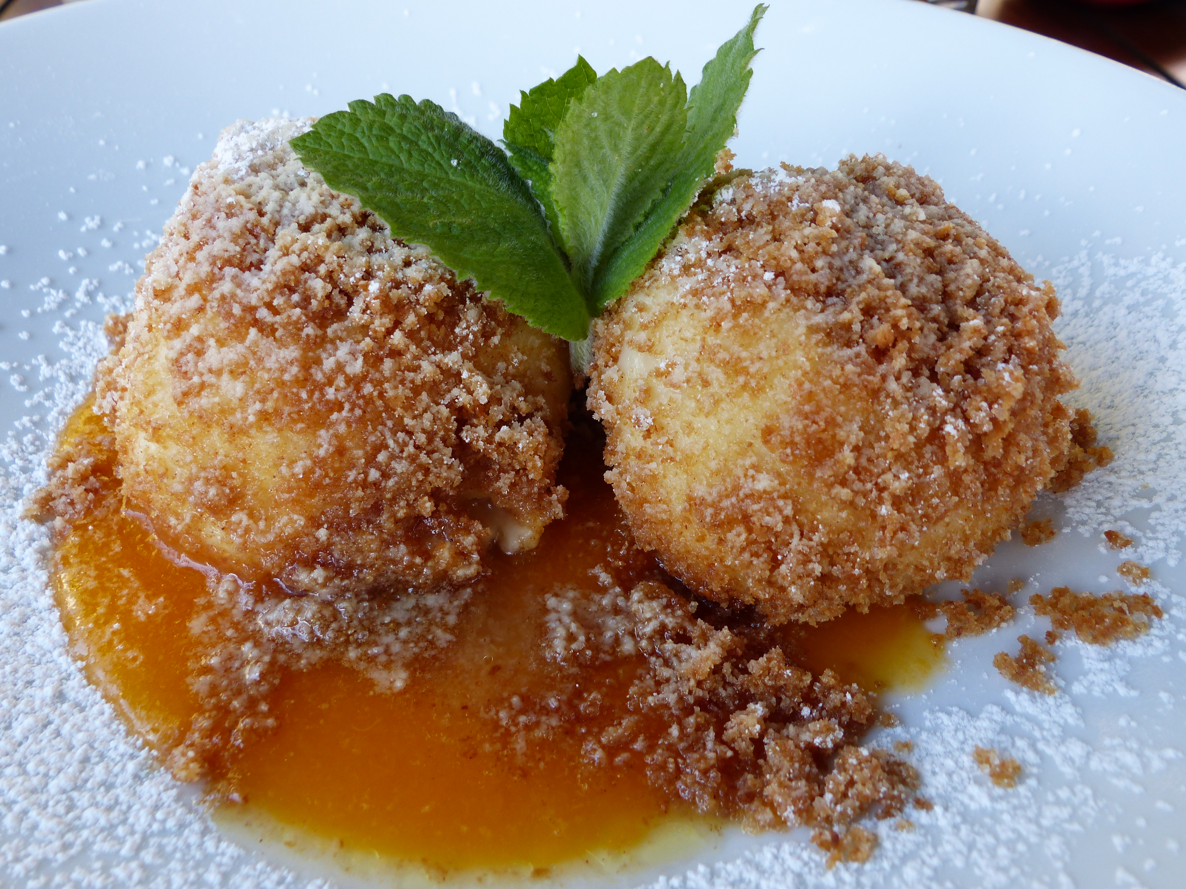 Marillenknödel (Gasthaus zur Krone, Laas)